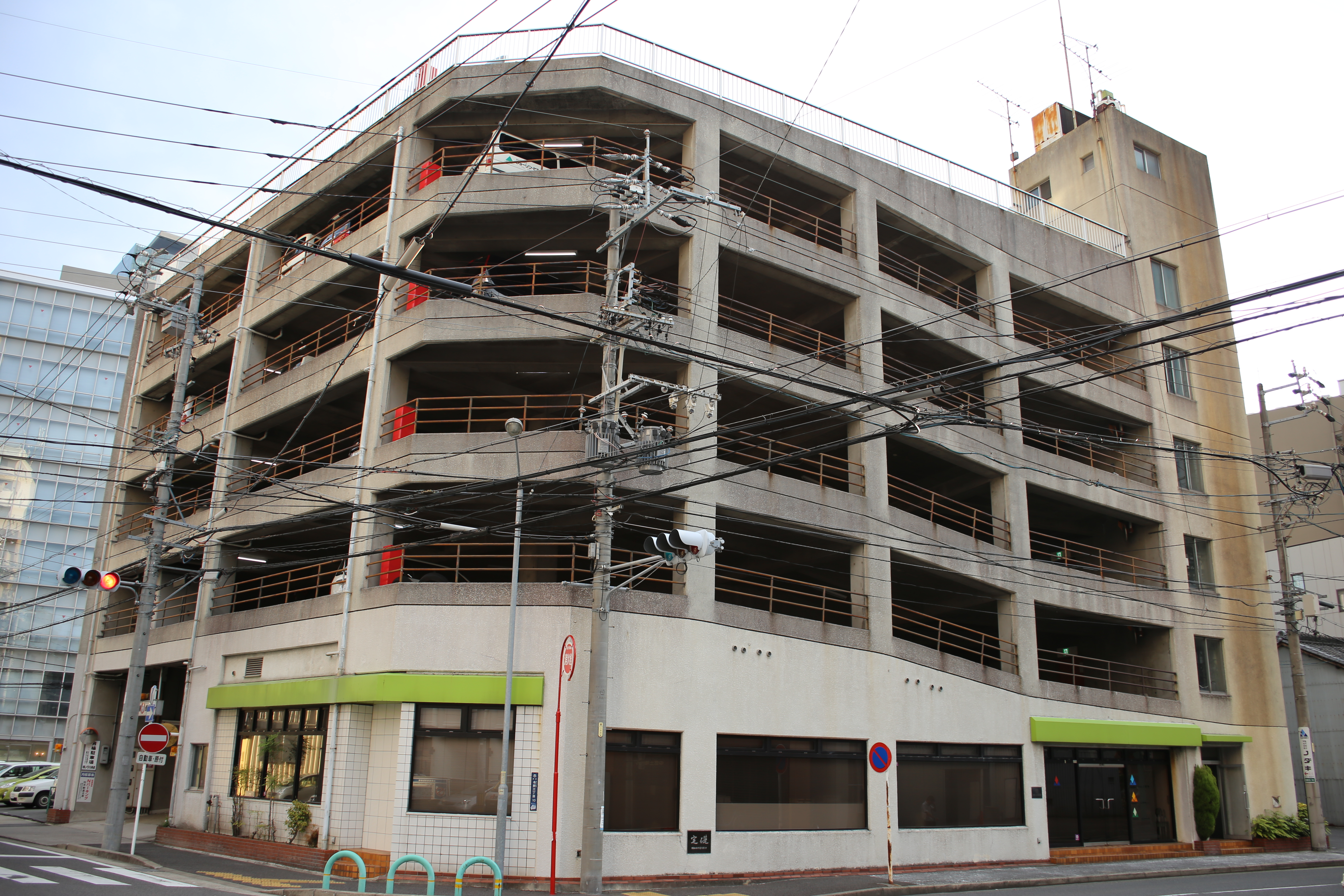 名古屋市西区名駅三丁目のノダキ本社を北側公道東側より撮影